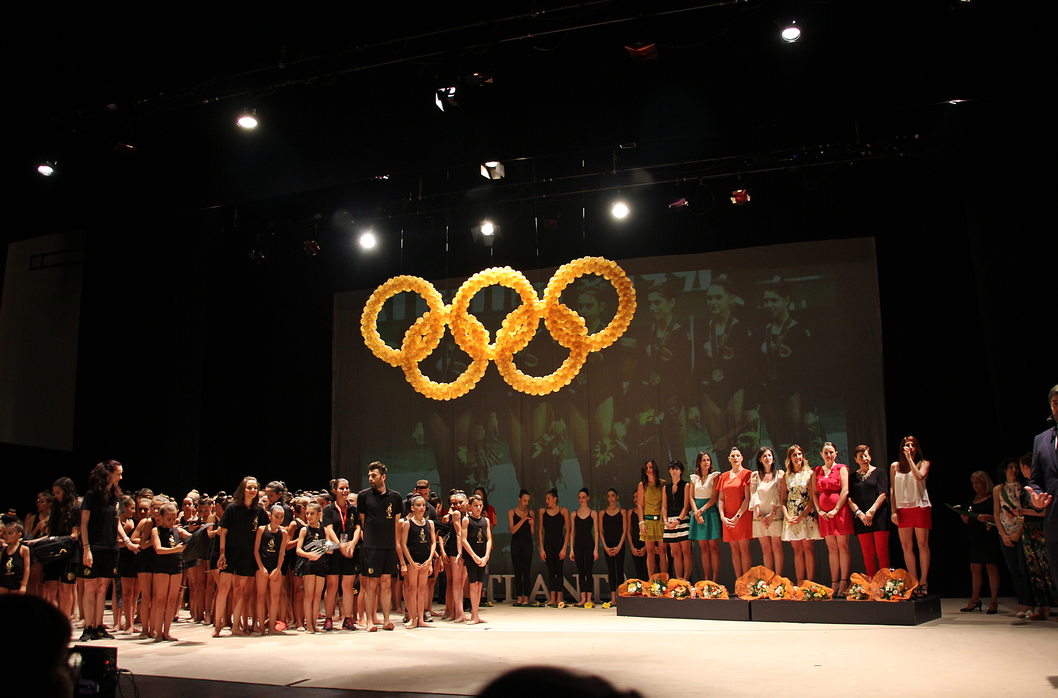 Vista general del escenario en la Gala 20º Aniversario de la Medalla de Oro de Atlanta '96 en Badajoz (2016).